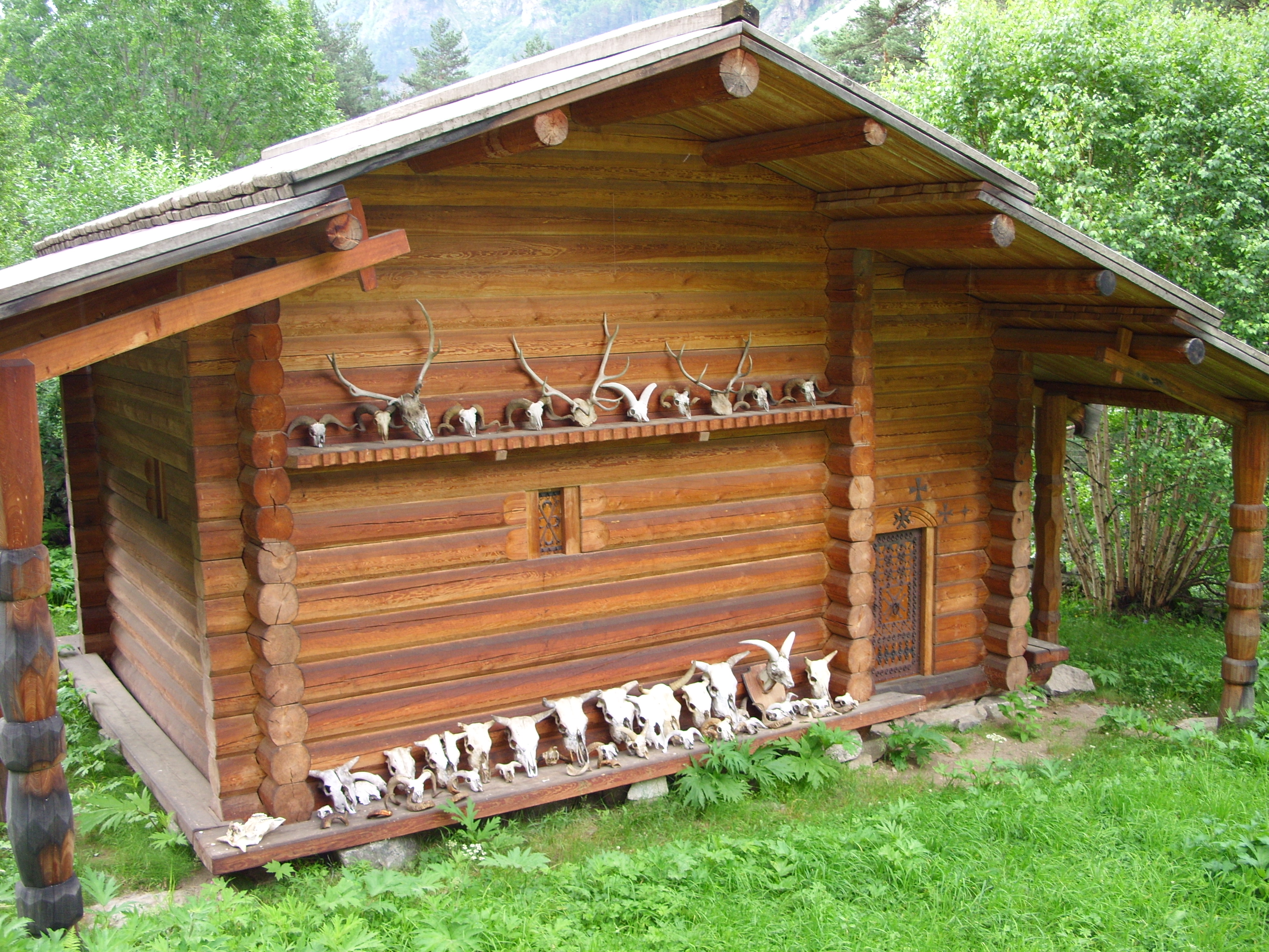 Снимки сделаны во время автобусной экскурсии из Железноводска, июль 2009 г.